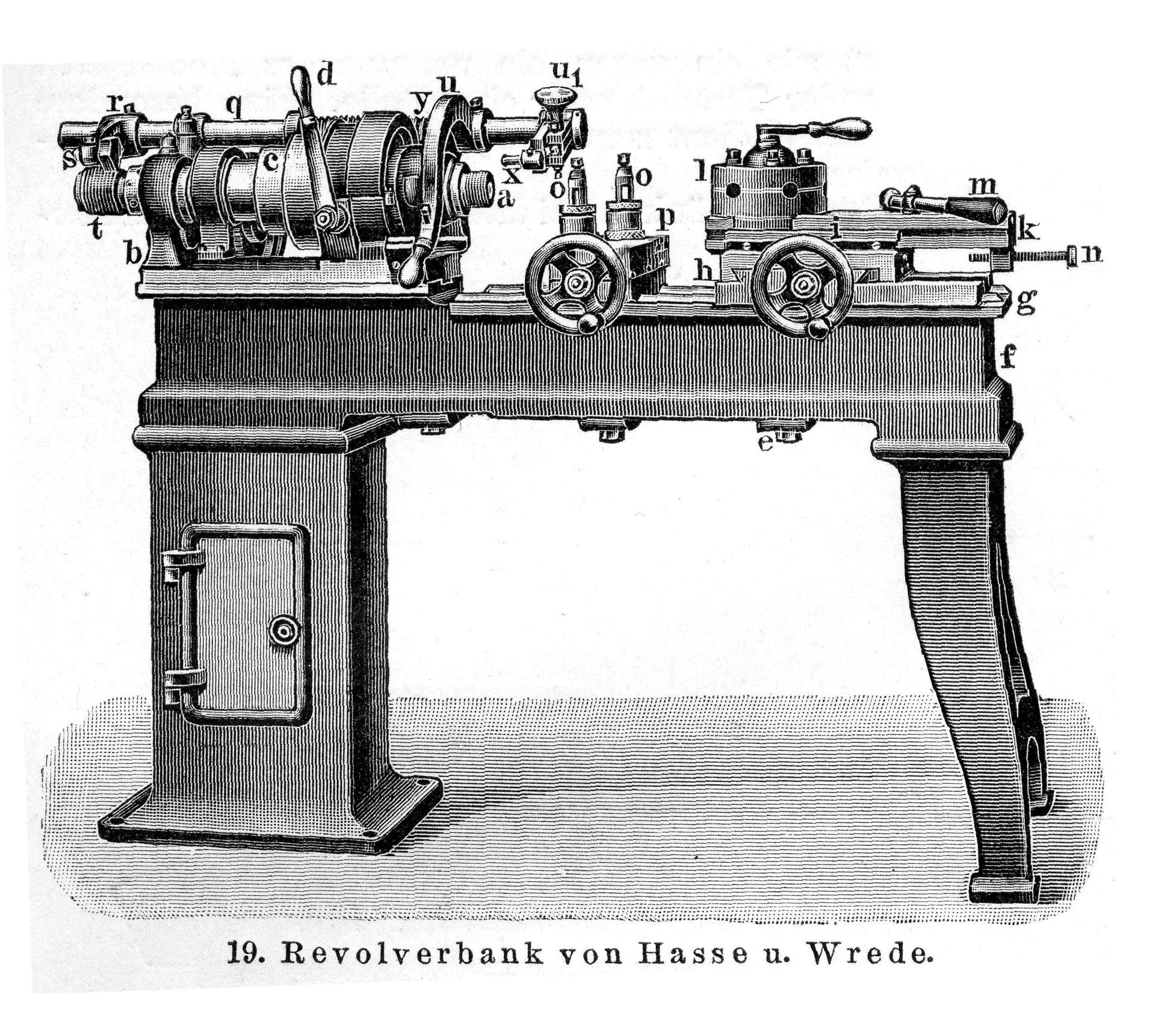 Schema-Zeichnung der Drehbank